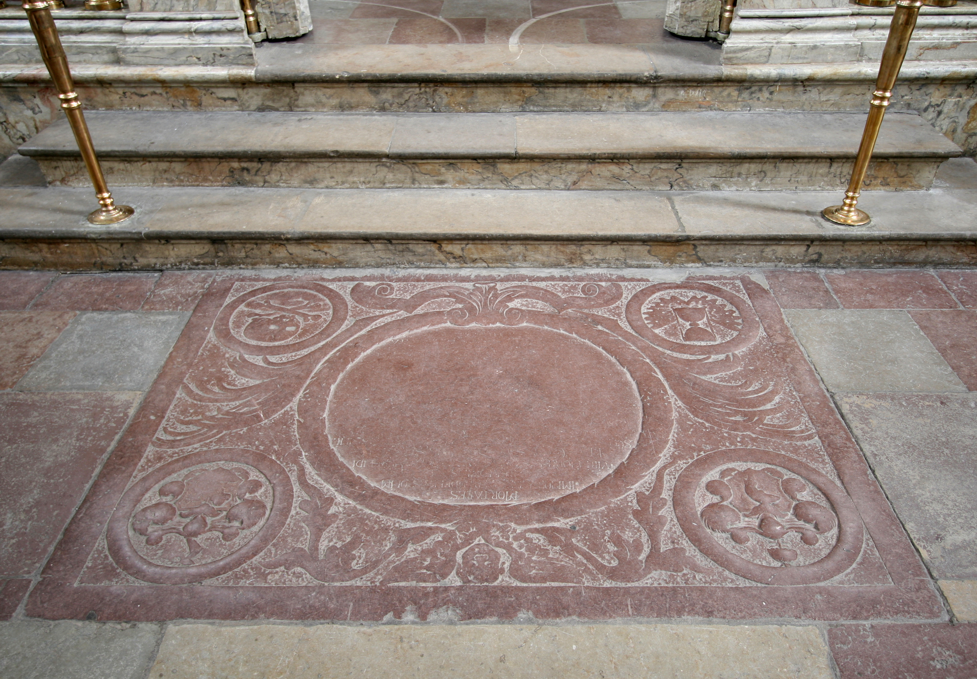 Trinitatis Kirke, Copenhagen, Denmark. Ligsten i gulvet, foran kortrappen. Indskrift ulæselig. o. 1730.